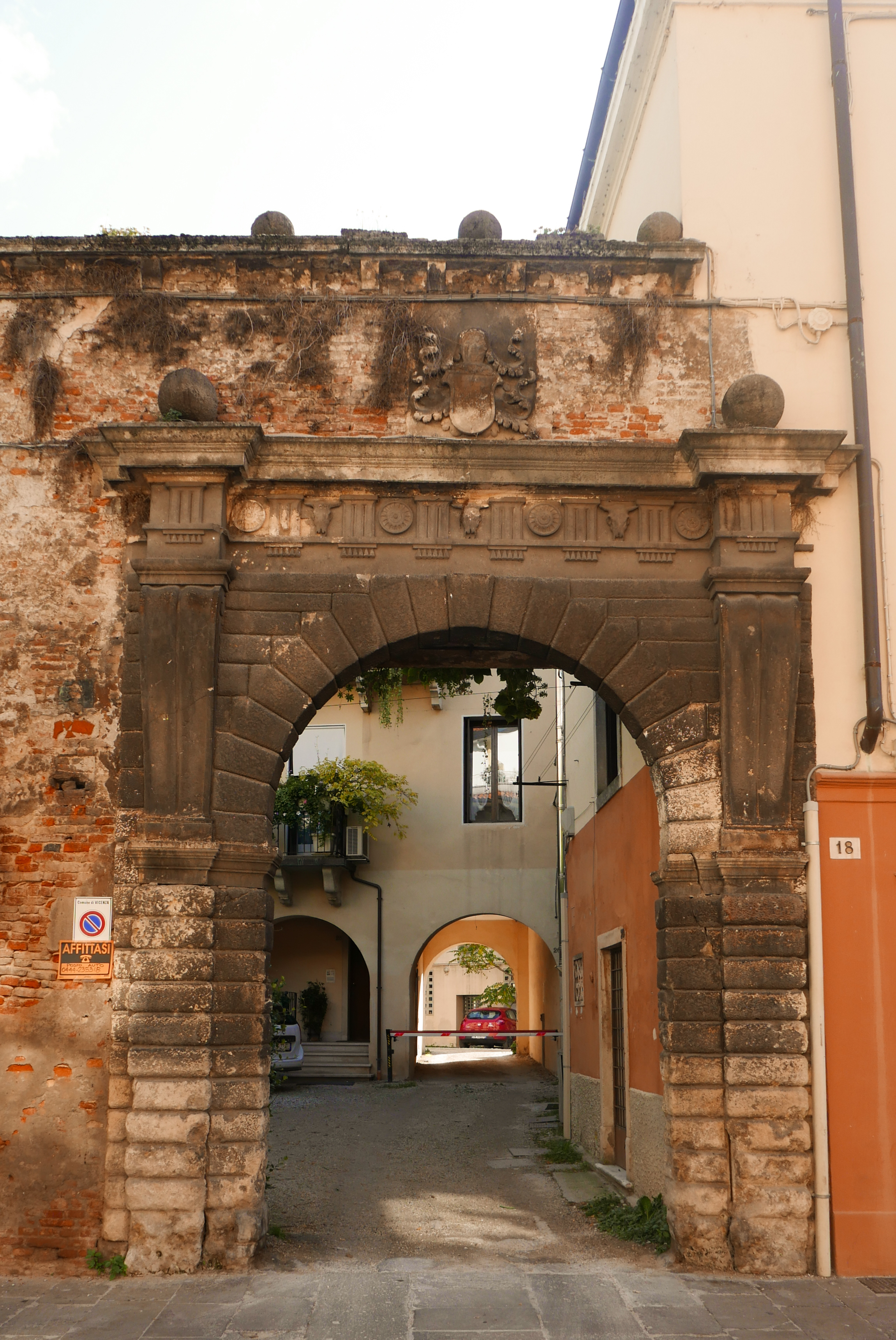 Portale delle case Thiene in contrà Santa Lucia